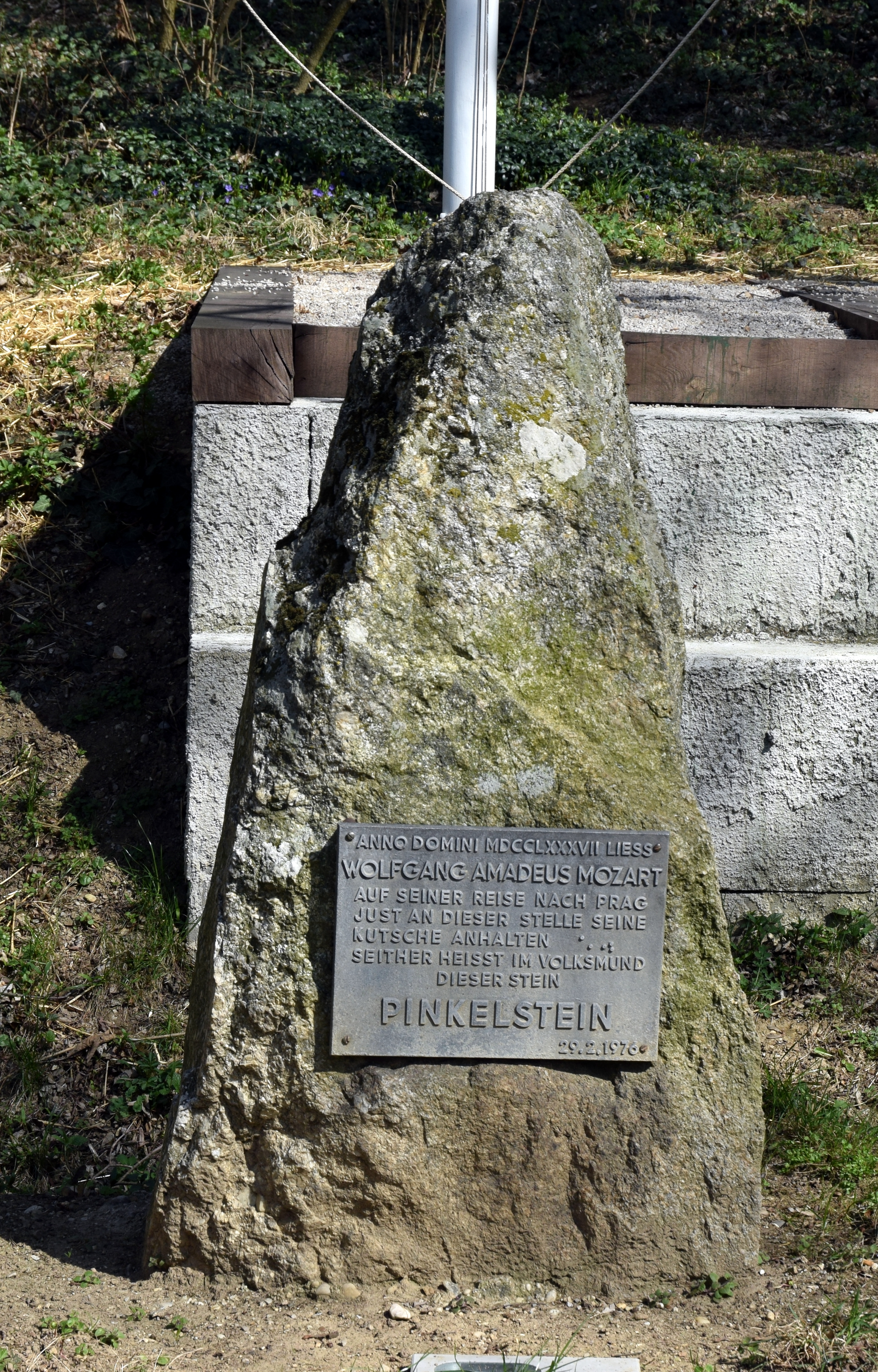 Der Pinkelstein in der Kellergasse Raschala / Alte Poststraße / „Pinkelsteinkellergasse“ in der KG Raschala in Hollabrunn